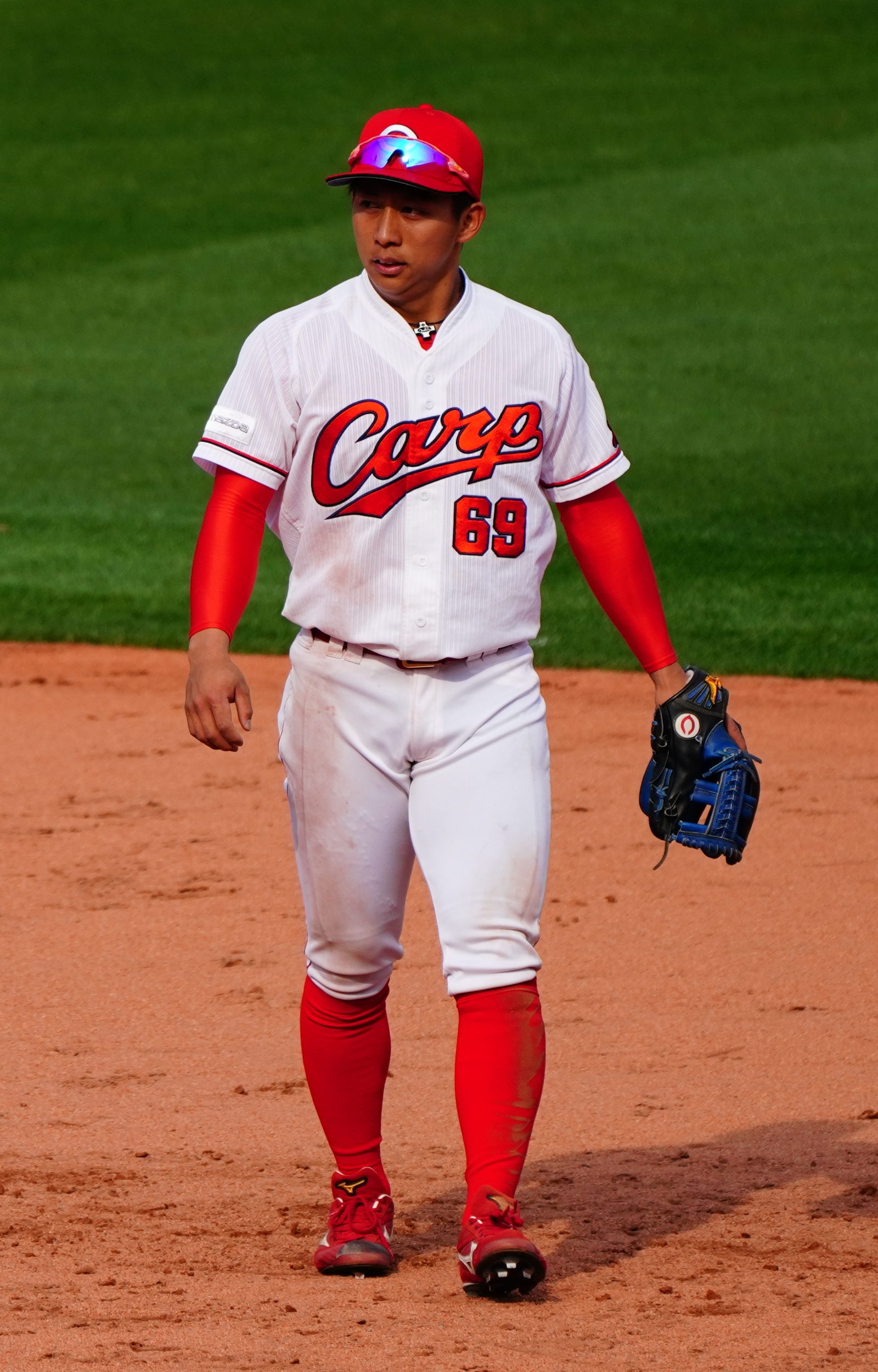 2019年3月7日、広島市民球場（マツダスタジアム）で本人撮影